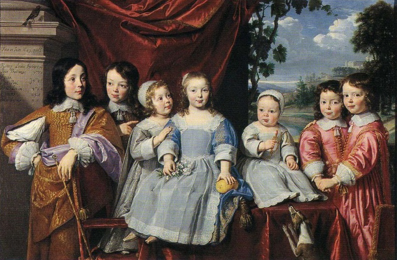 Liste des enfants inscrit sur le tableau Henry Louis Habert, Jean Baltazar, Louis et Jean Paul jumeaux, Anne Louise, François, Jean Louis. Fit en juin 1649 par P. Champaigne.